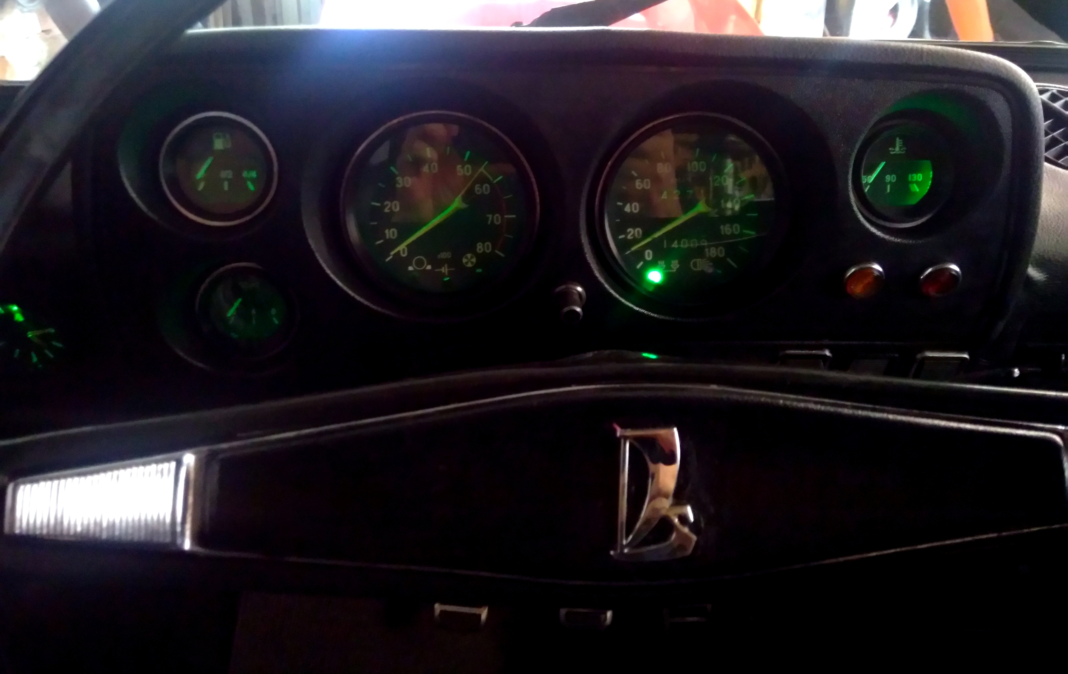 Lada 2121 y su Panel de Instrumentos desde 1977 a 1996 : Velocímetro, Tacómetro, manómetro de presión de aceite e indicador de temperatura de refrigerante y deposito de combustible.